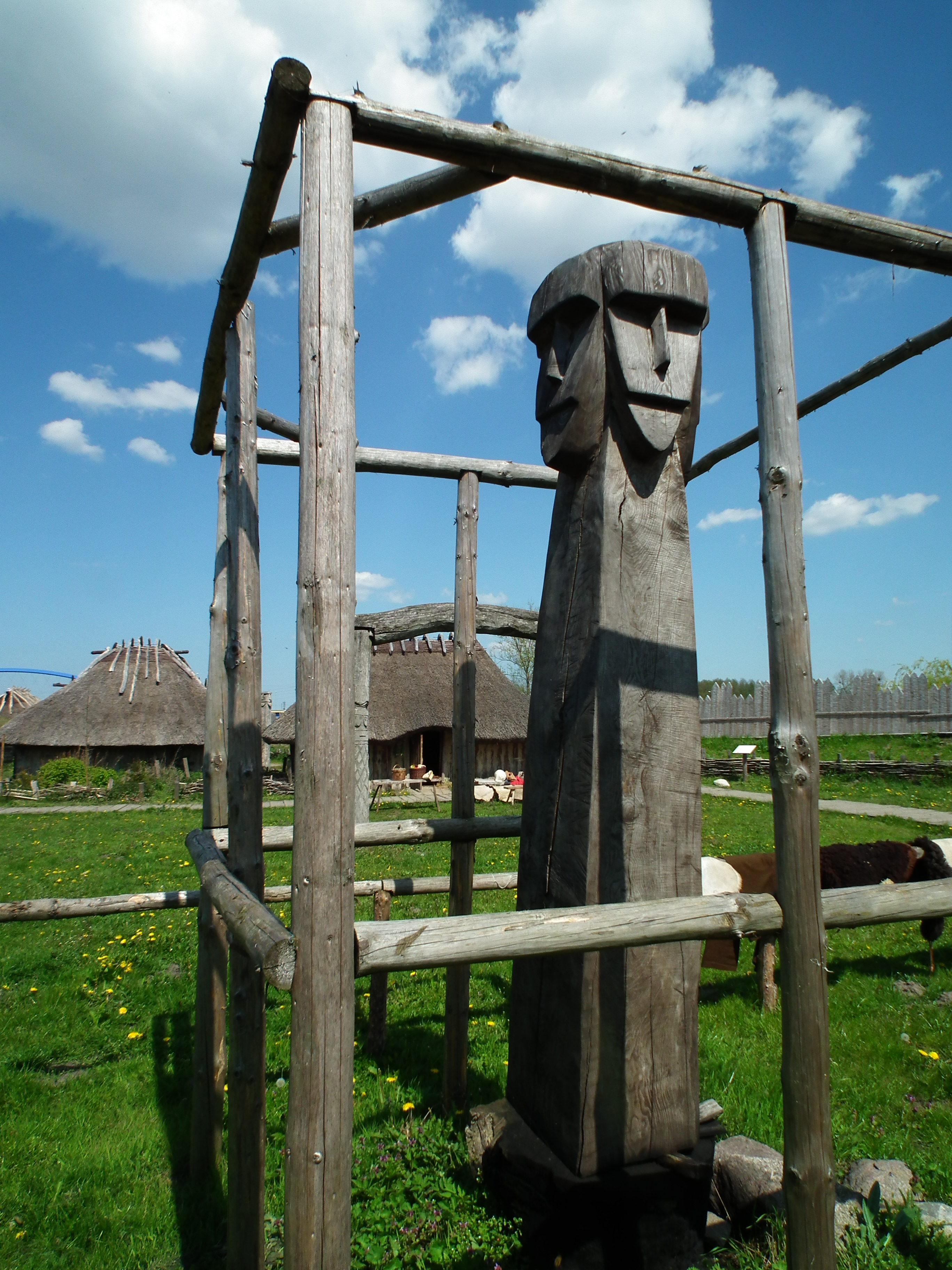 Centrum Słowian i Wikingów w Wolinie-Recławiu.